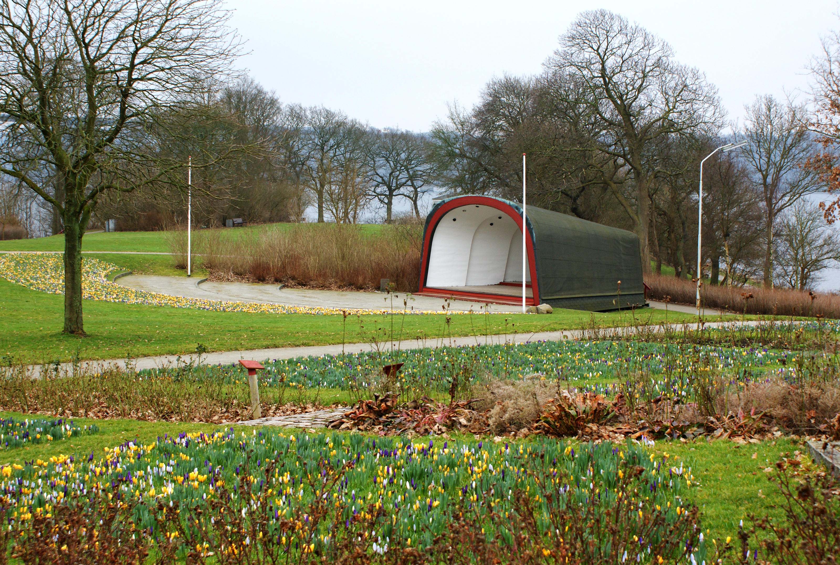 Pavillon i parken Skyttehuset i Vejle.